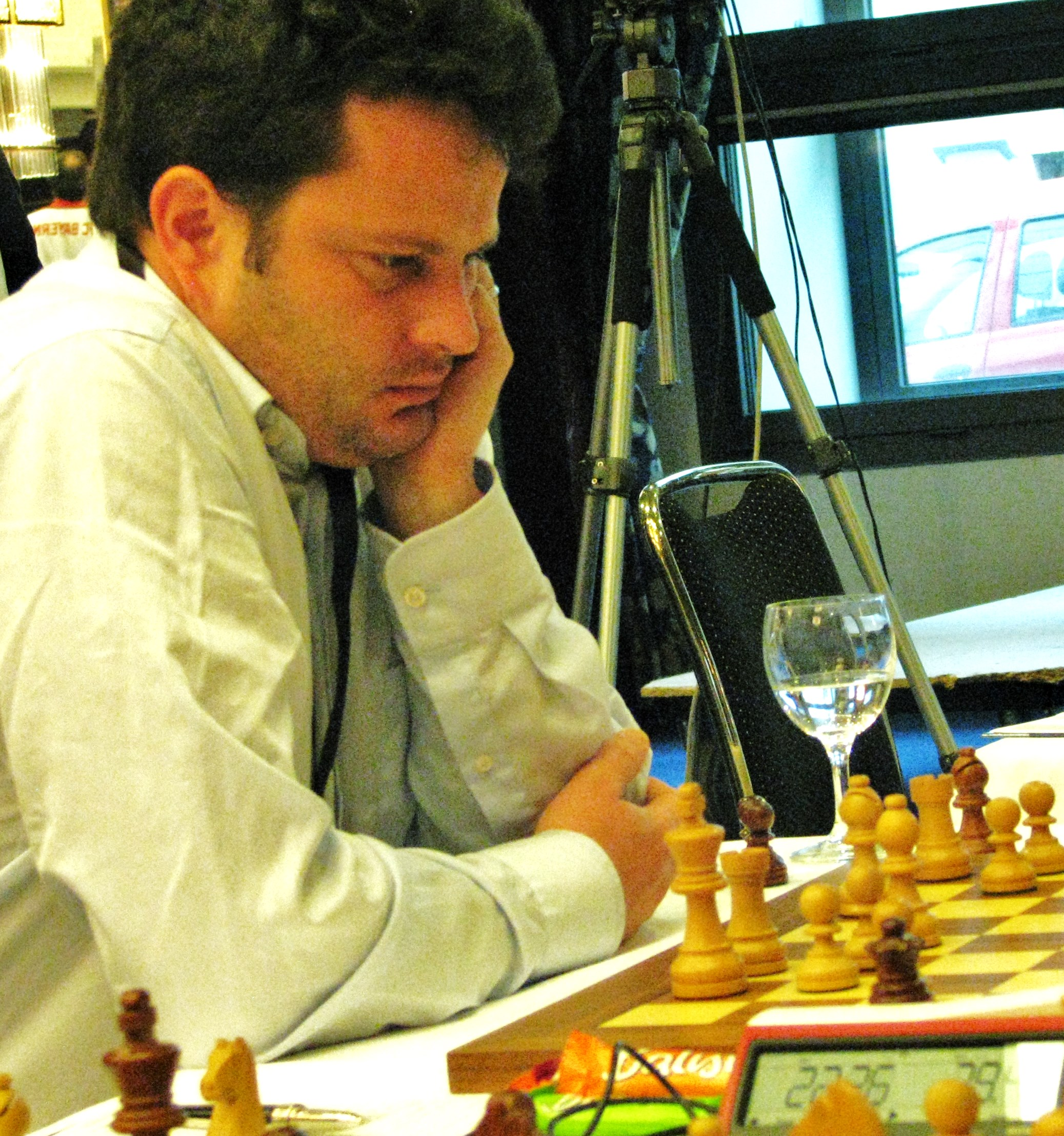 Étienne Bacrot für die OSG Baden-Baden bei der Bundesliga-Finalrunde 2017 in Berlin